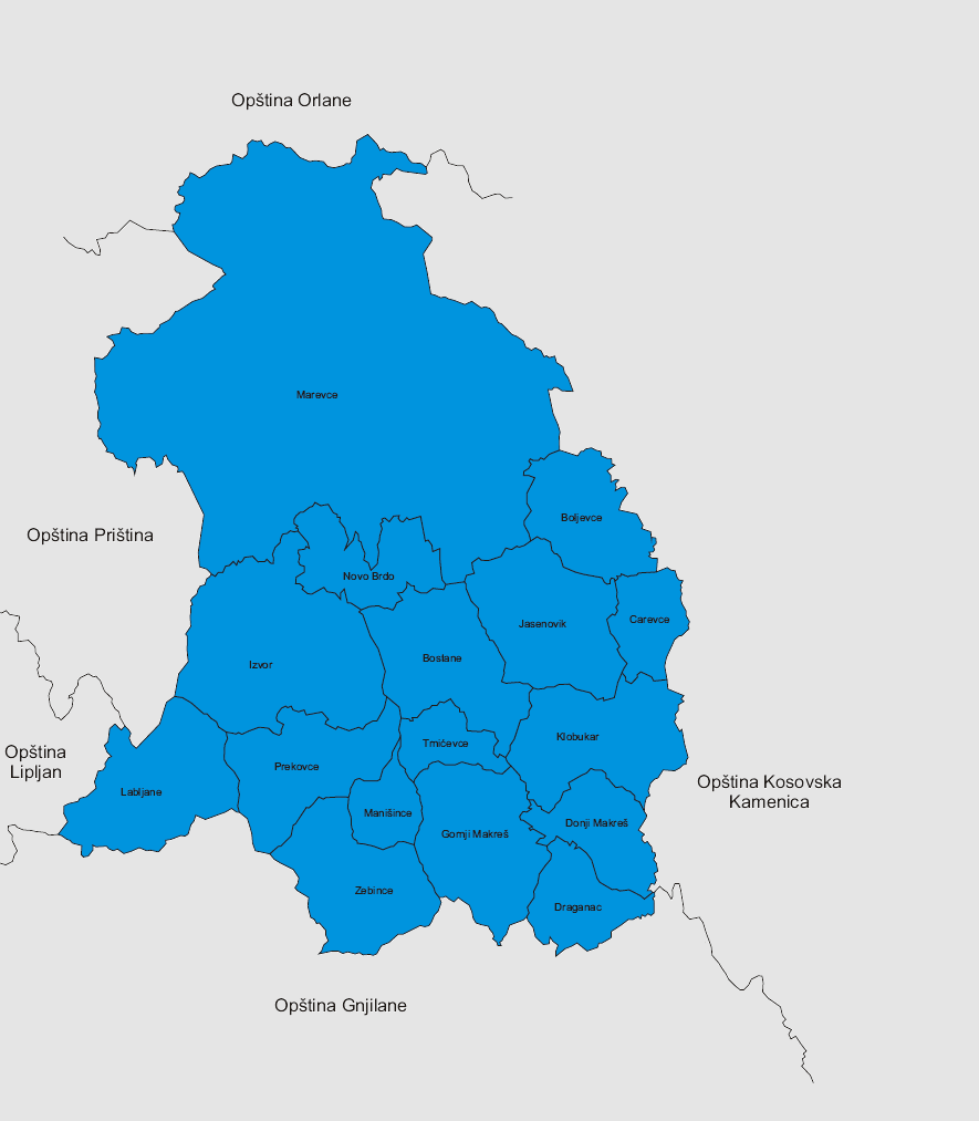 аутор Варјачић Владимир извор: Закон о територијалној организацији републике Србије